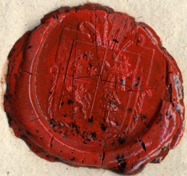 A Jurenák de solutz francia nemesi család címere egy pecséten a 19. század első feléből.